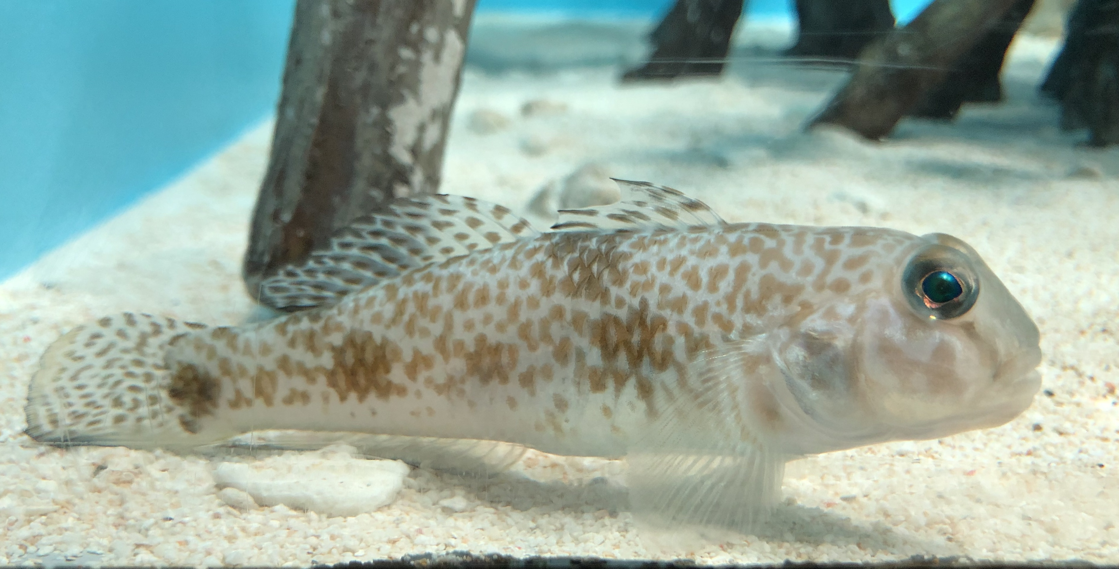 ツムギハゼ。サンシャイン水族館飼育個体。